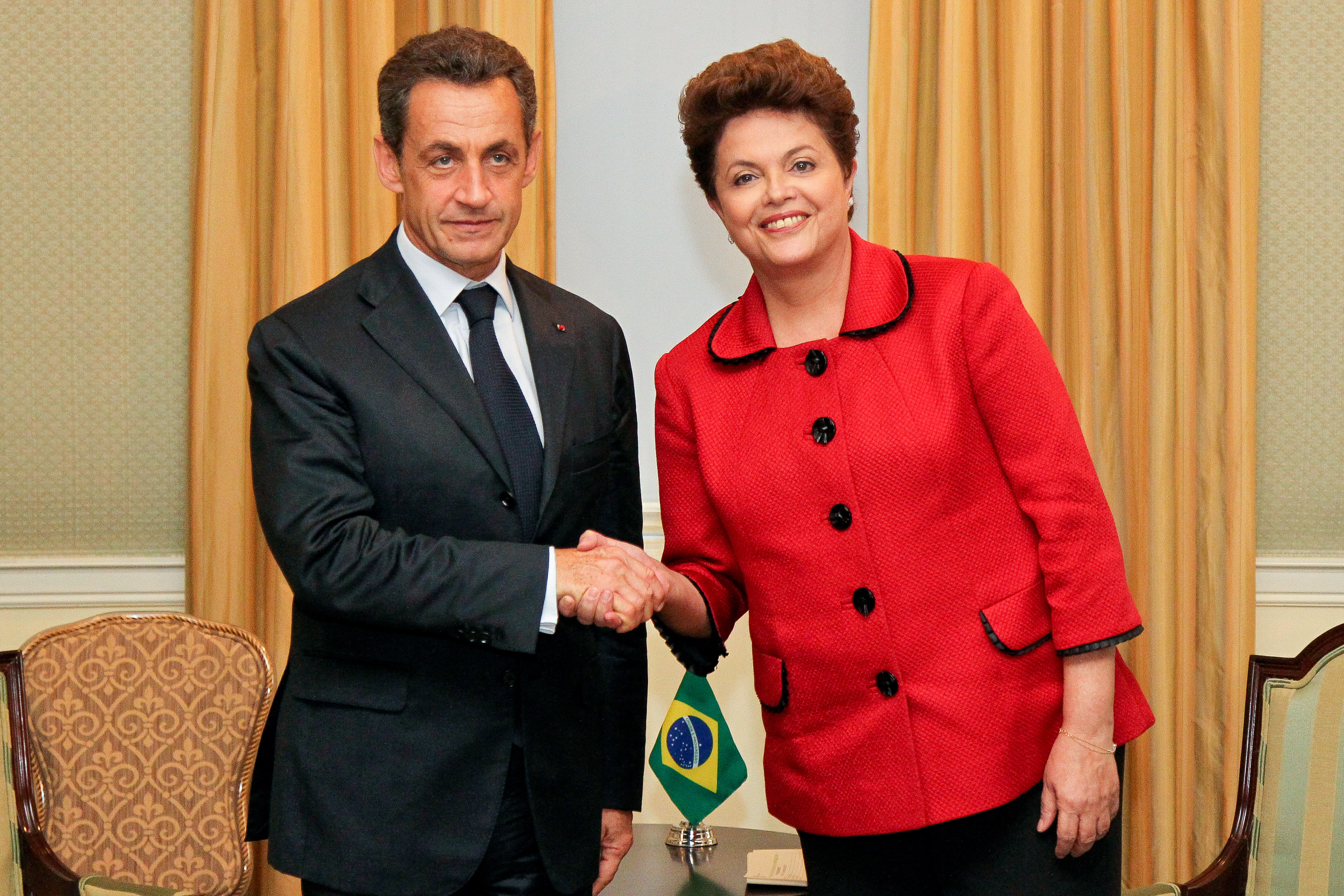 Nova Iorque - EUA, 21/09/2011. Presidenta Dilma Rousseff durante encontro bilateral com o presidente da França, Nicolas Sarkozy no Hotel Waldorf Astoria. Foto: Roberto Stuckert Filho/PR.